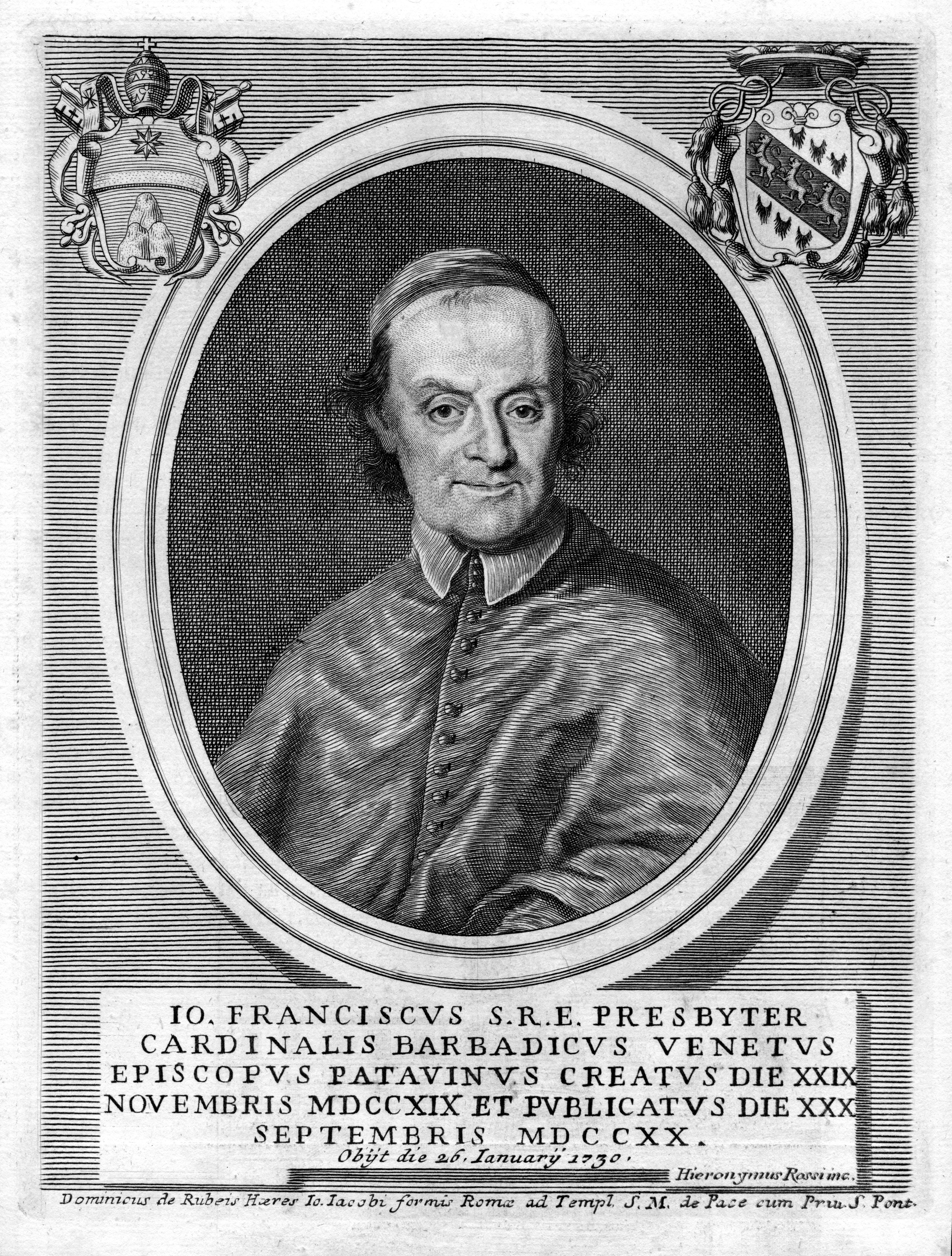 Portrait de Giovanni Francesco Barbarigo (1658-1730)